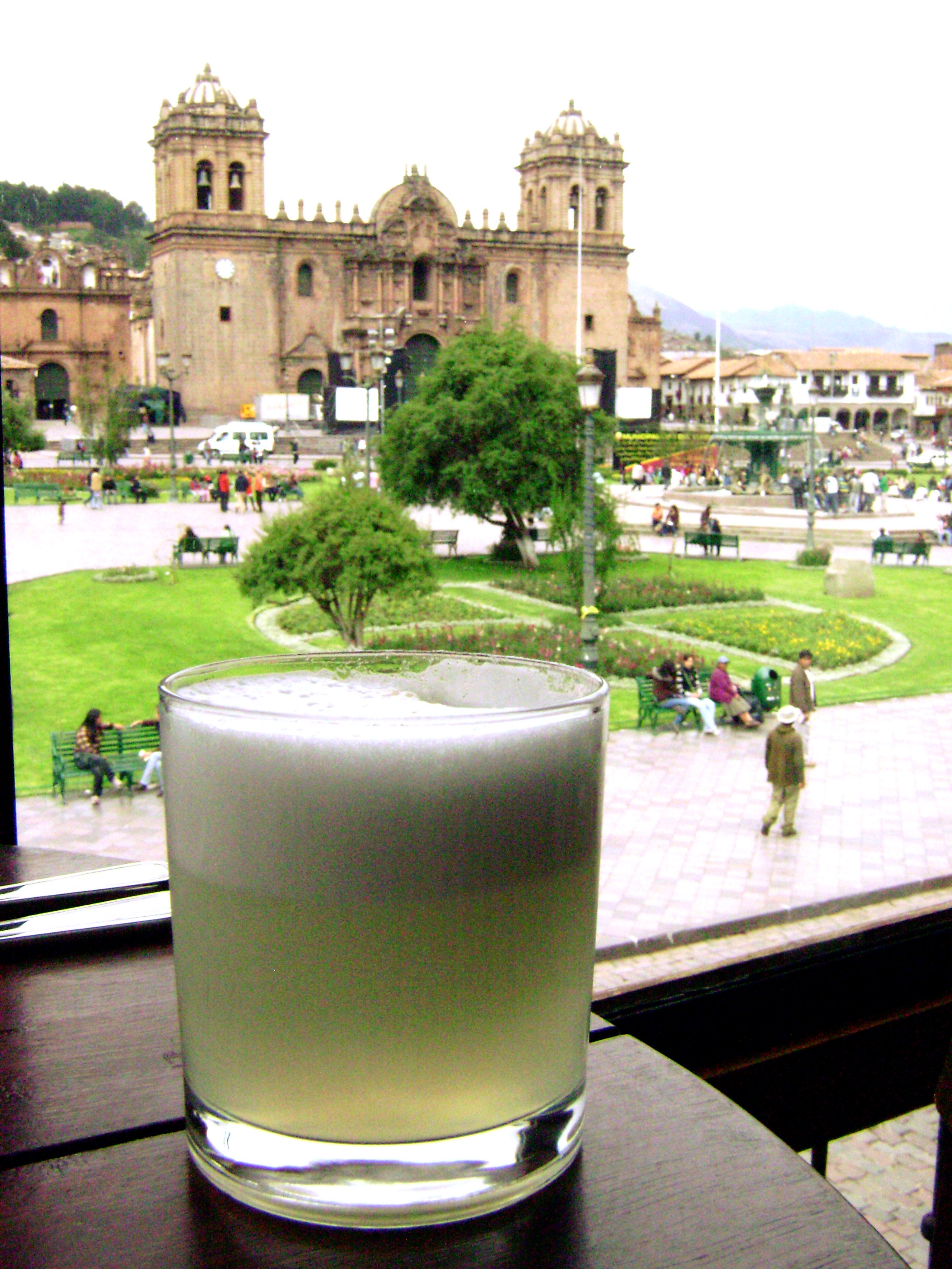 Pisco sour. Cusco, Perú.